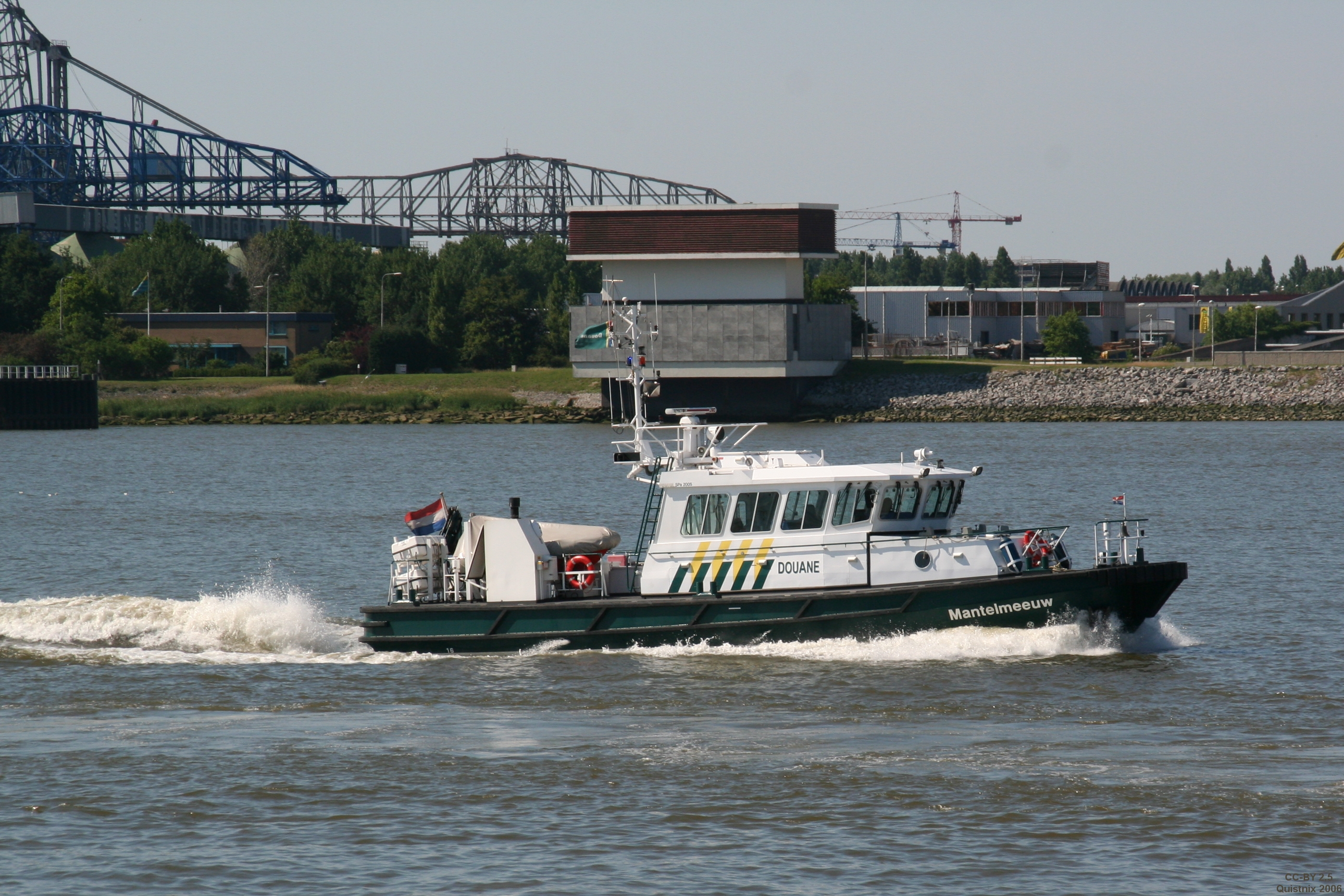 Douaneschip "Mantelmeeuw" in de Rotterdamse haven.